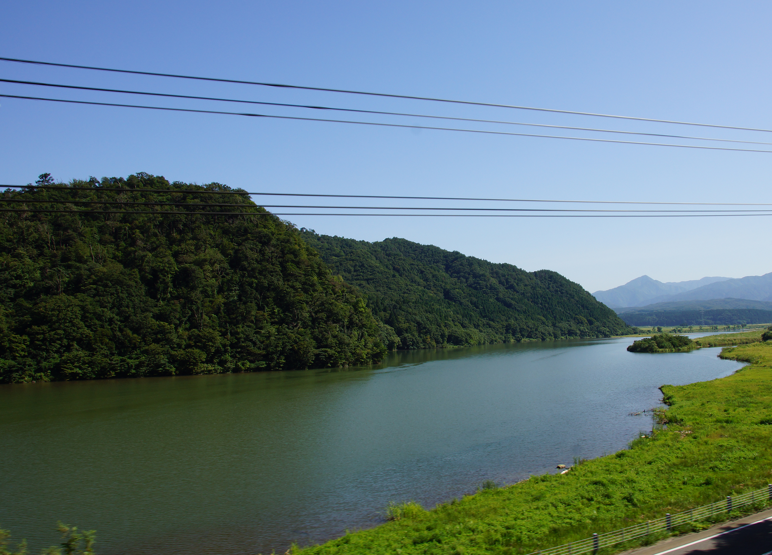 越後大島駅手前の車窓